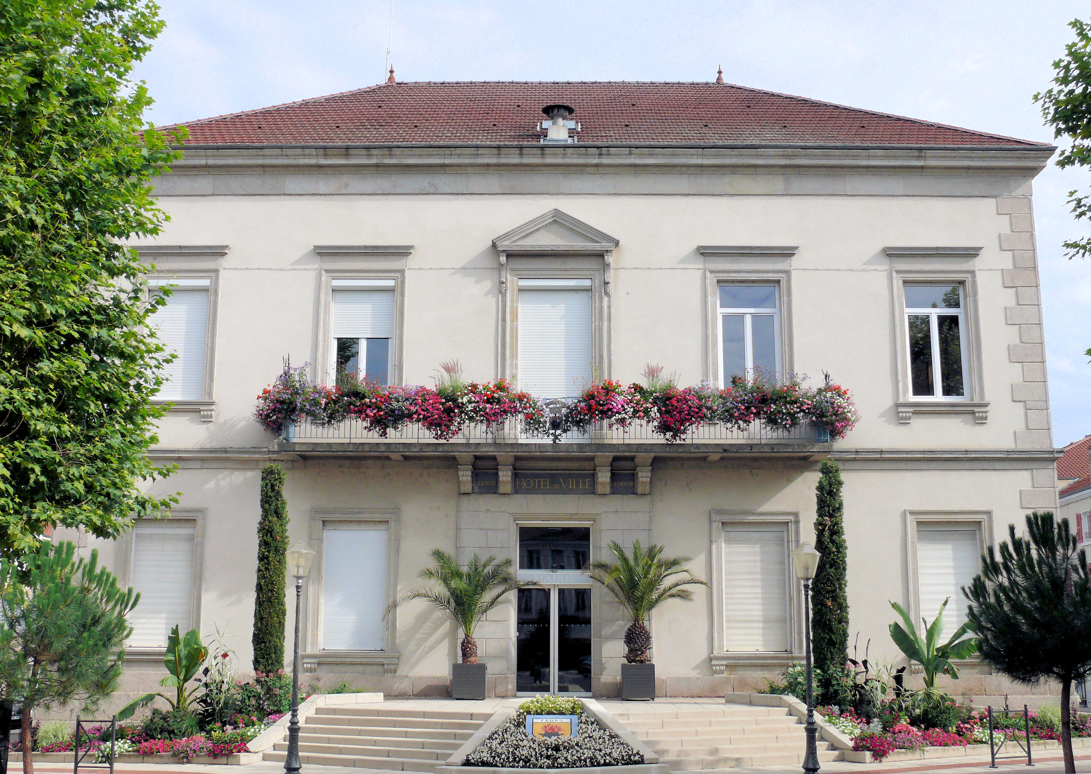 Feurs - Hôtel de ville